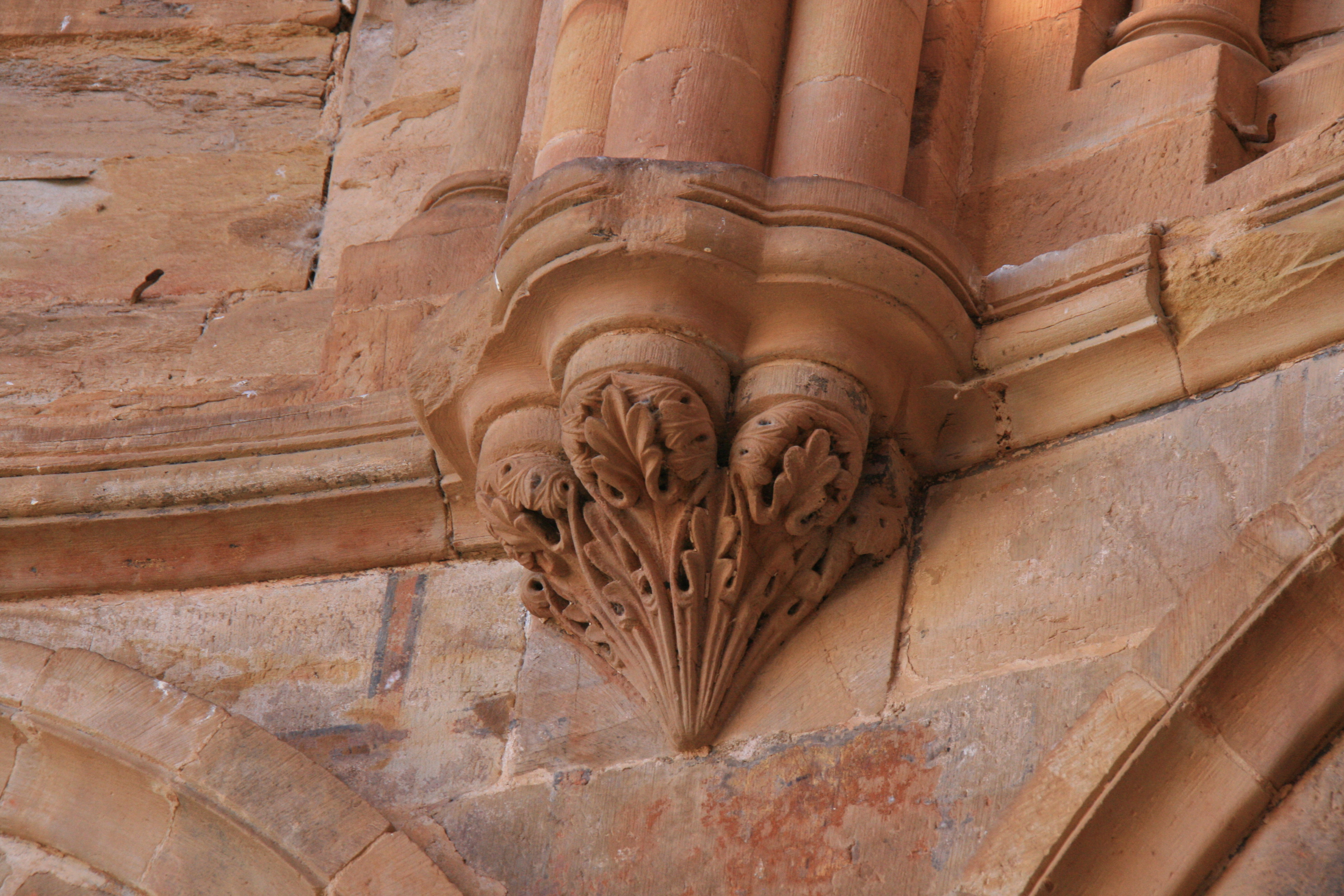 Ornamento de la Iglesia de Santa María de Moreruela